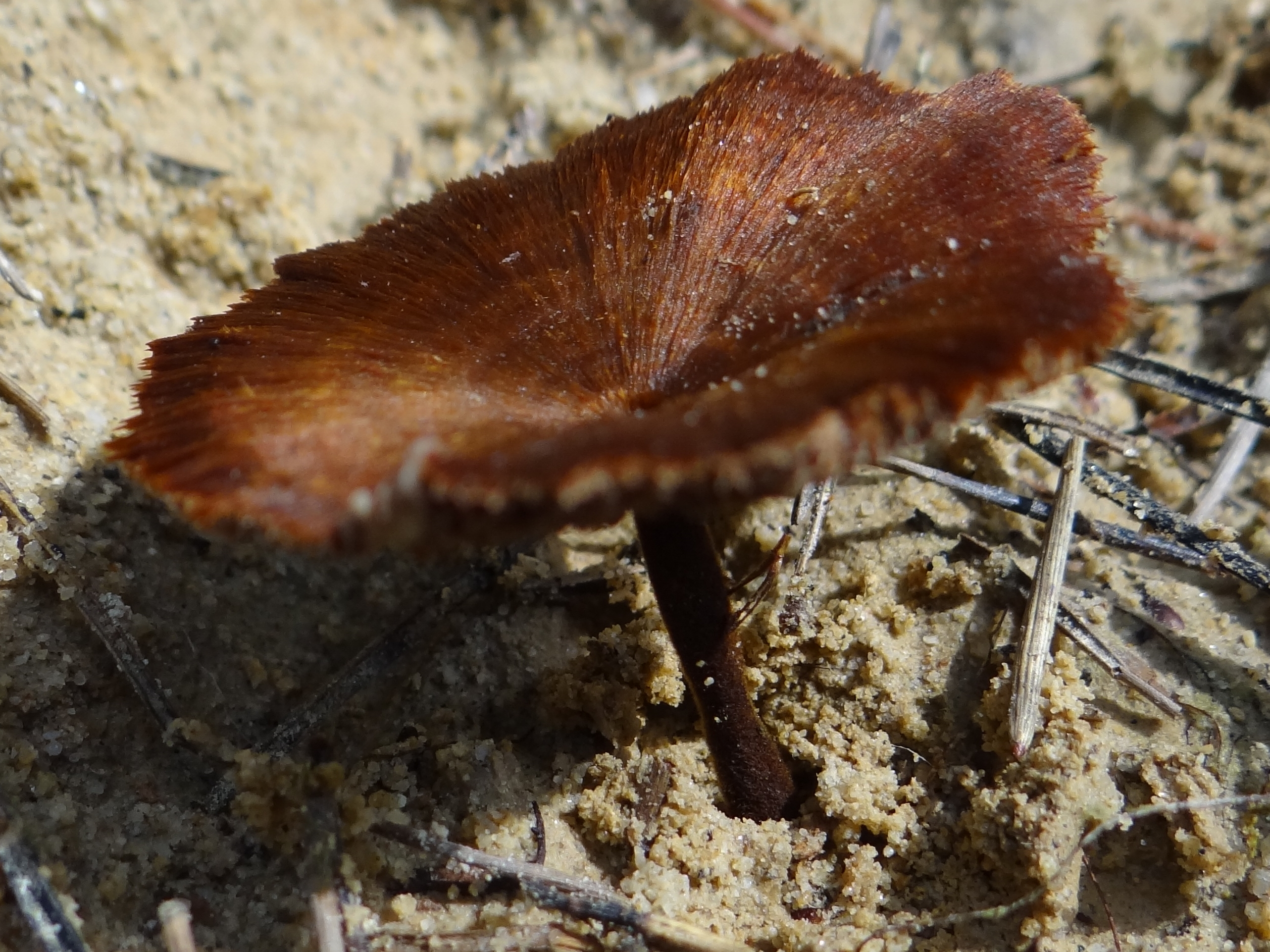 Coltricia cinnamomea (location: Poland, Kamionna, województwo małopolskie)